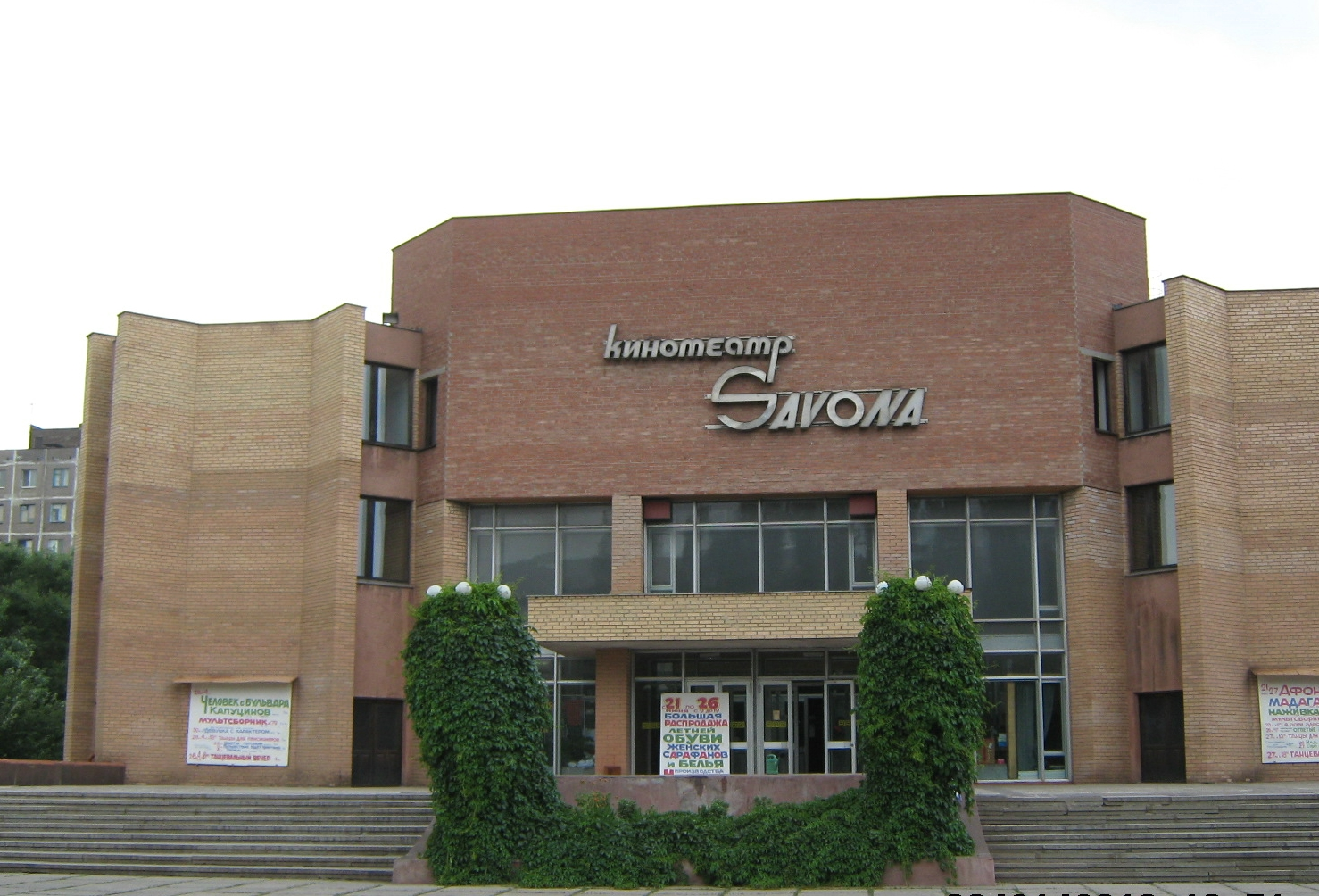 Кінотеатр Савона